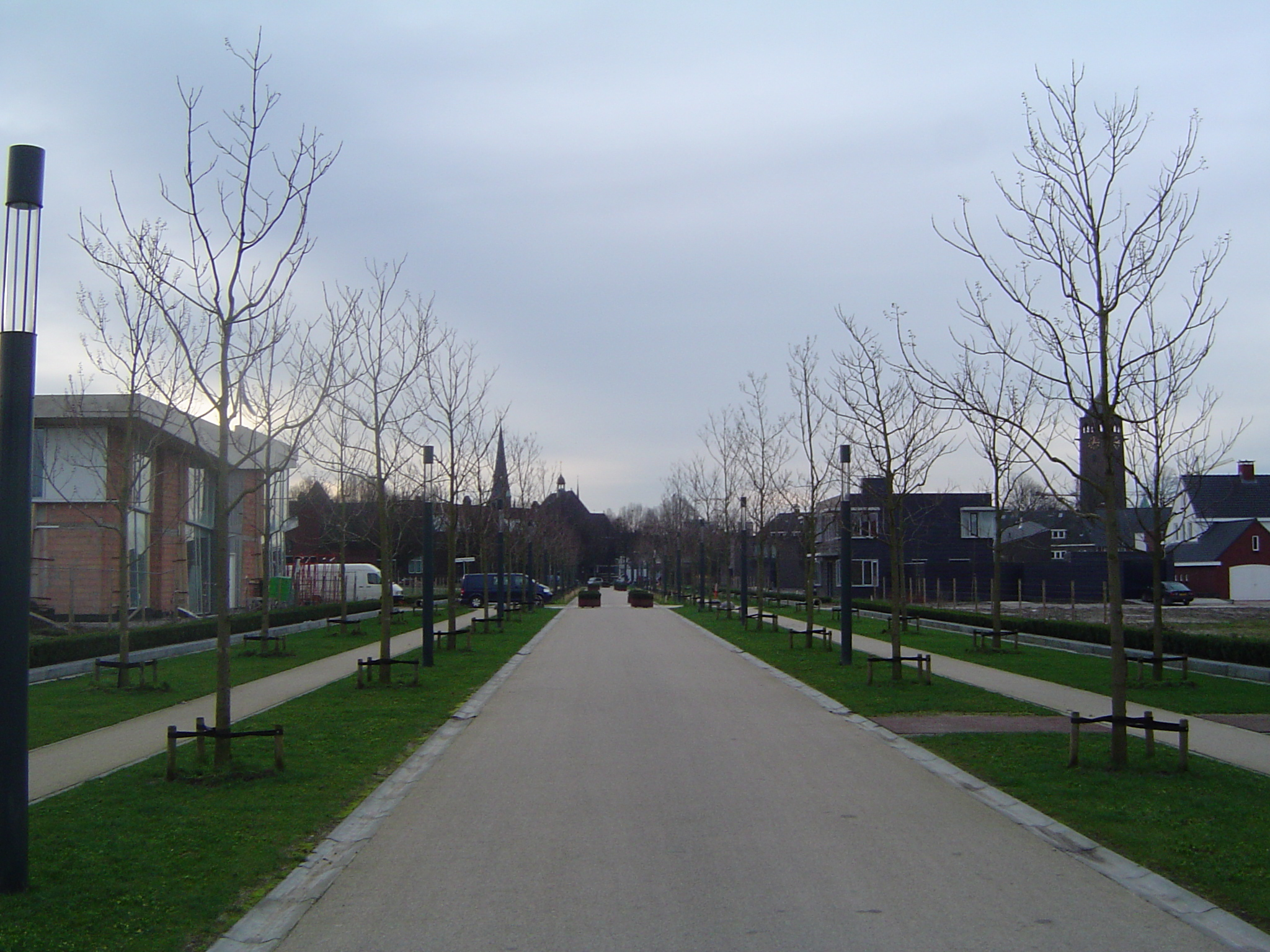 Uitzicht op het Rijksmuseum Twente